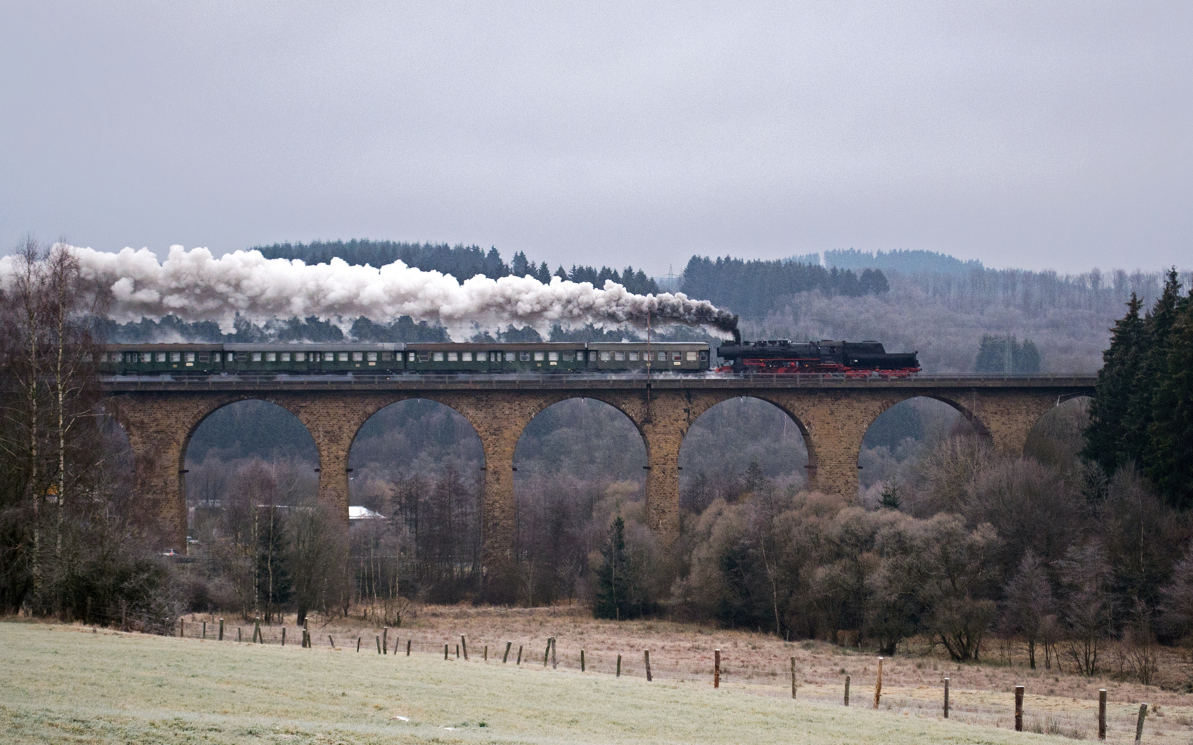 Die Reko-Dampflokomotive 52 8134-0 der Eisenbahnfreunde Betzdorf mit einem Sonderzug auf dem Rudersdorfer Viadukt.